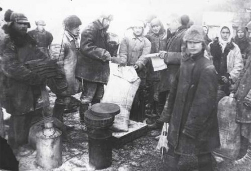 1933. Выдача продуктов колхозникам на трудодни, с.Удачное Донецкой области